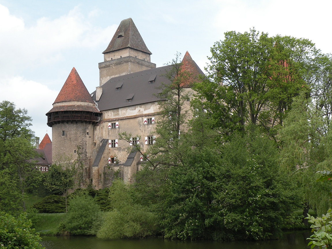 Wasserburg Heidenreichstein im Oberen Waldviertel in der Stadt Heidenreichstein im Bezirk Gmünd im Bundesland Niederösterreich